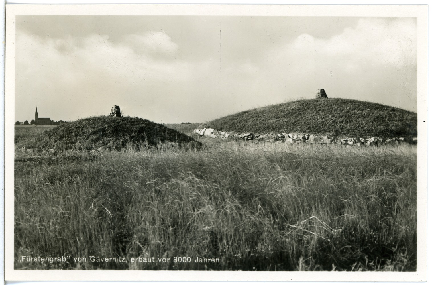 Gävernitz; Fürstengrab This postcard is from publisher Brück & Sohn in Meißen ( postcard has a unique number 26010 and is available in a higher resolution at the publisher. This images was uploaded in a cooperation project between Wikipedians and the publisher.